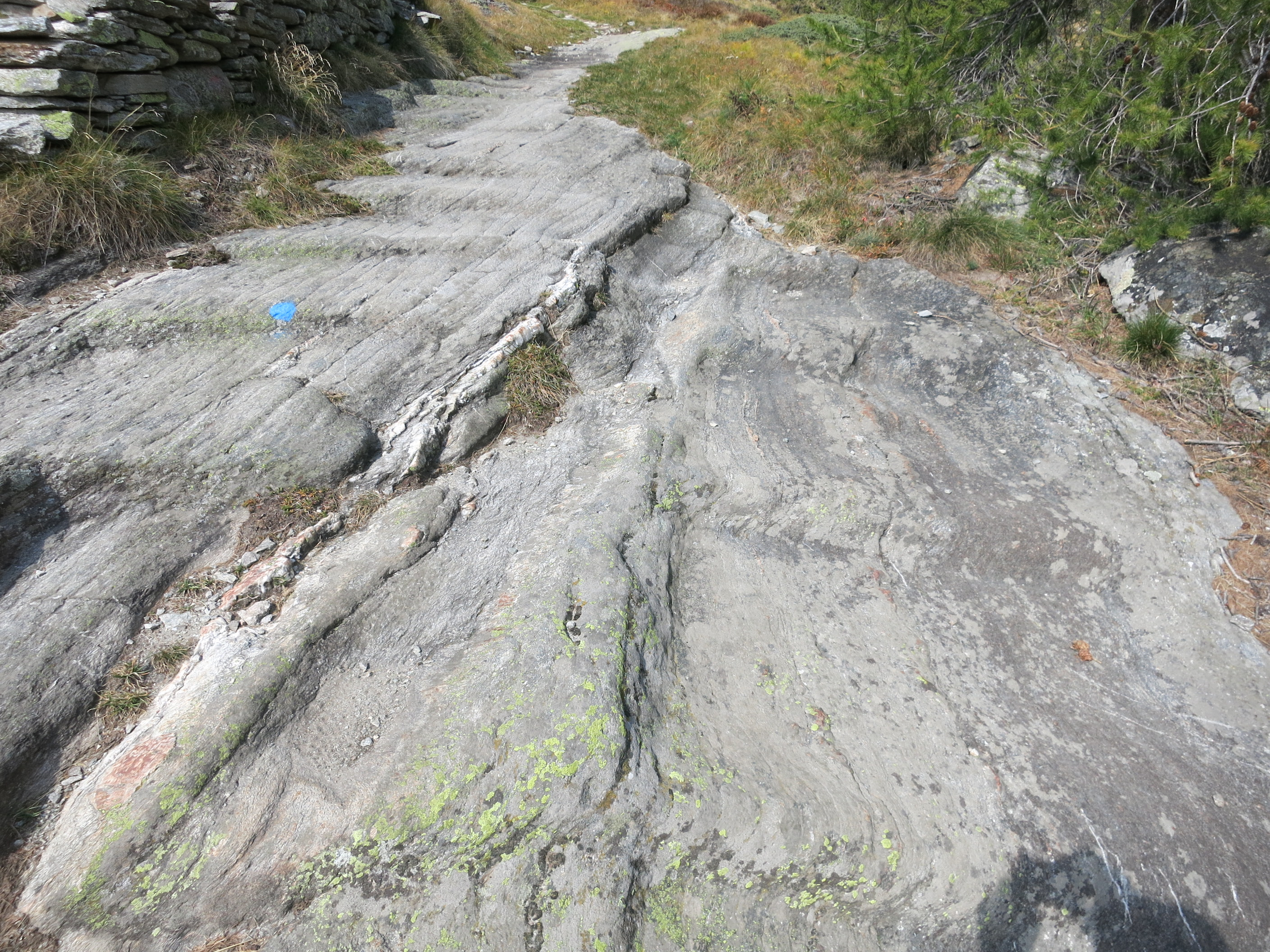 Stockalperweg Engiloch, Simplon VS, Schweiz